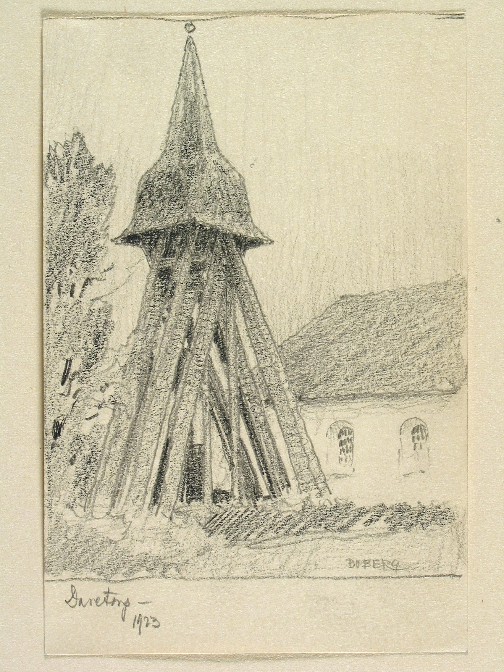 Västergötland, Vartofta hd., Daretorps kyrka. Teckning av Ferdinand Boberg. Depicted place: Q10713189 (Q10713189) (Härad), Daretorps kyrka (Ortnamn därutöver), Sweden (Q34)